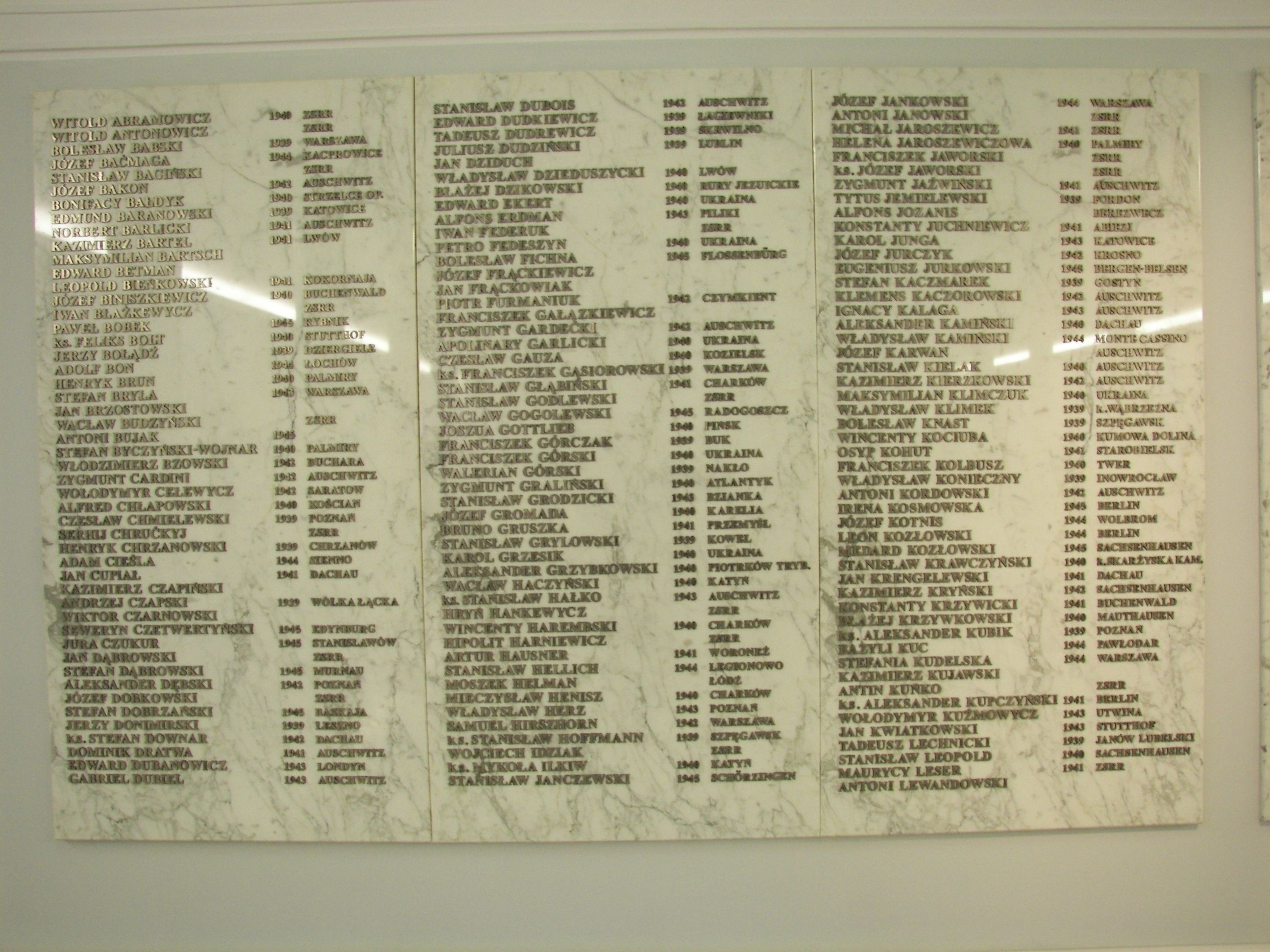 Sejm RP, fragment tablicy (od strony sali plenarnej) w hołdzie posłom II Rzeczypospolitej, poległym w czasie Drugiej Wojny Światowej, budynek główny, pierwsze piętro, zdjęcie wykonane 24 stycznia 2007 roku, autor: Piotr VaGla Waglowski